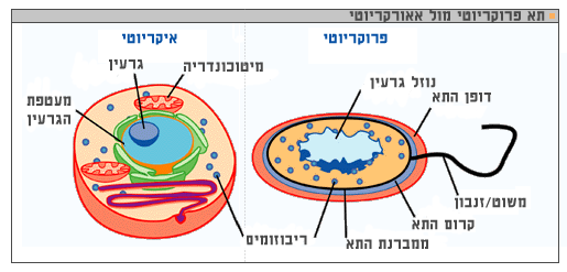 הבדלים בין תא אאוקריוטי לפרוקריוטי